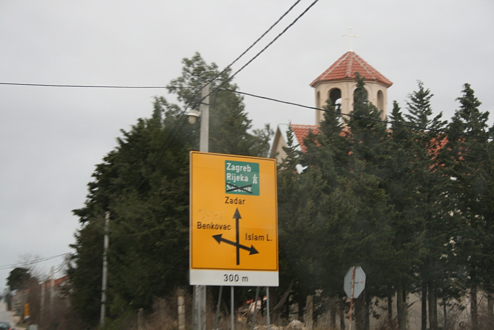 Zagreb_Split